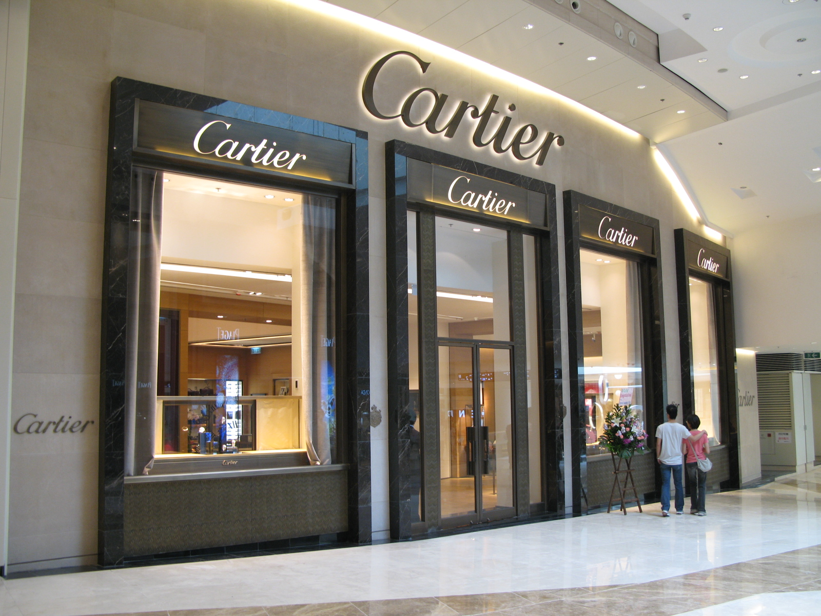 Cartier Store in Hong Kong Elements